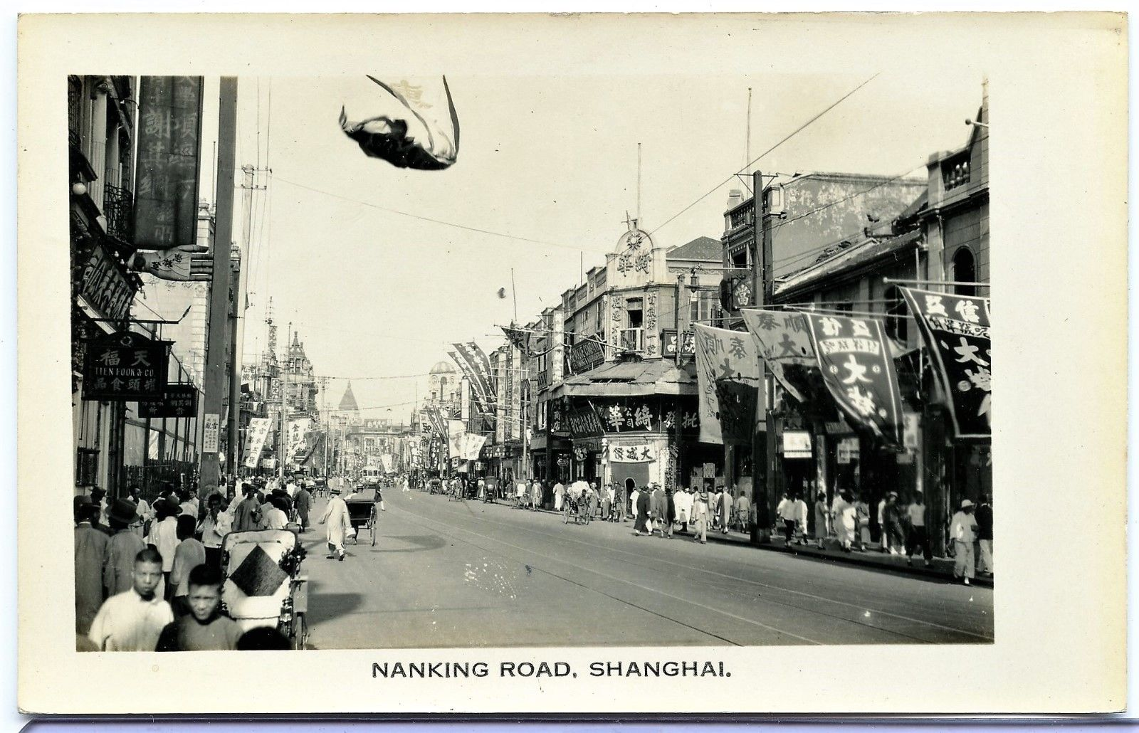 约1930年代的上海南京路